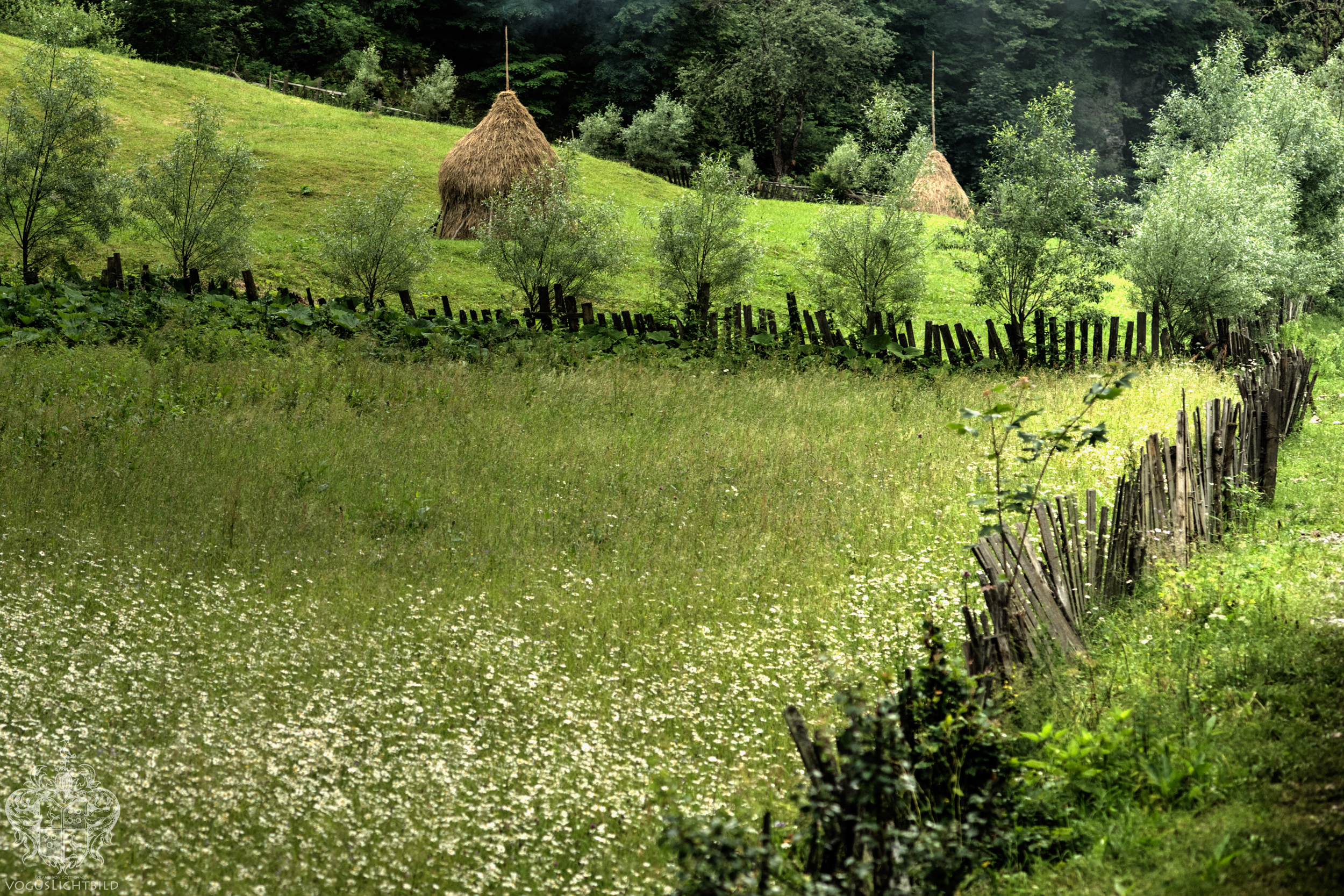 Kleinbäuerliche Wiesenwirtschaft im Wassertal vom Zug aus betrachtet